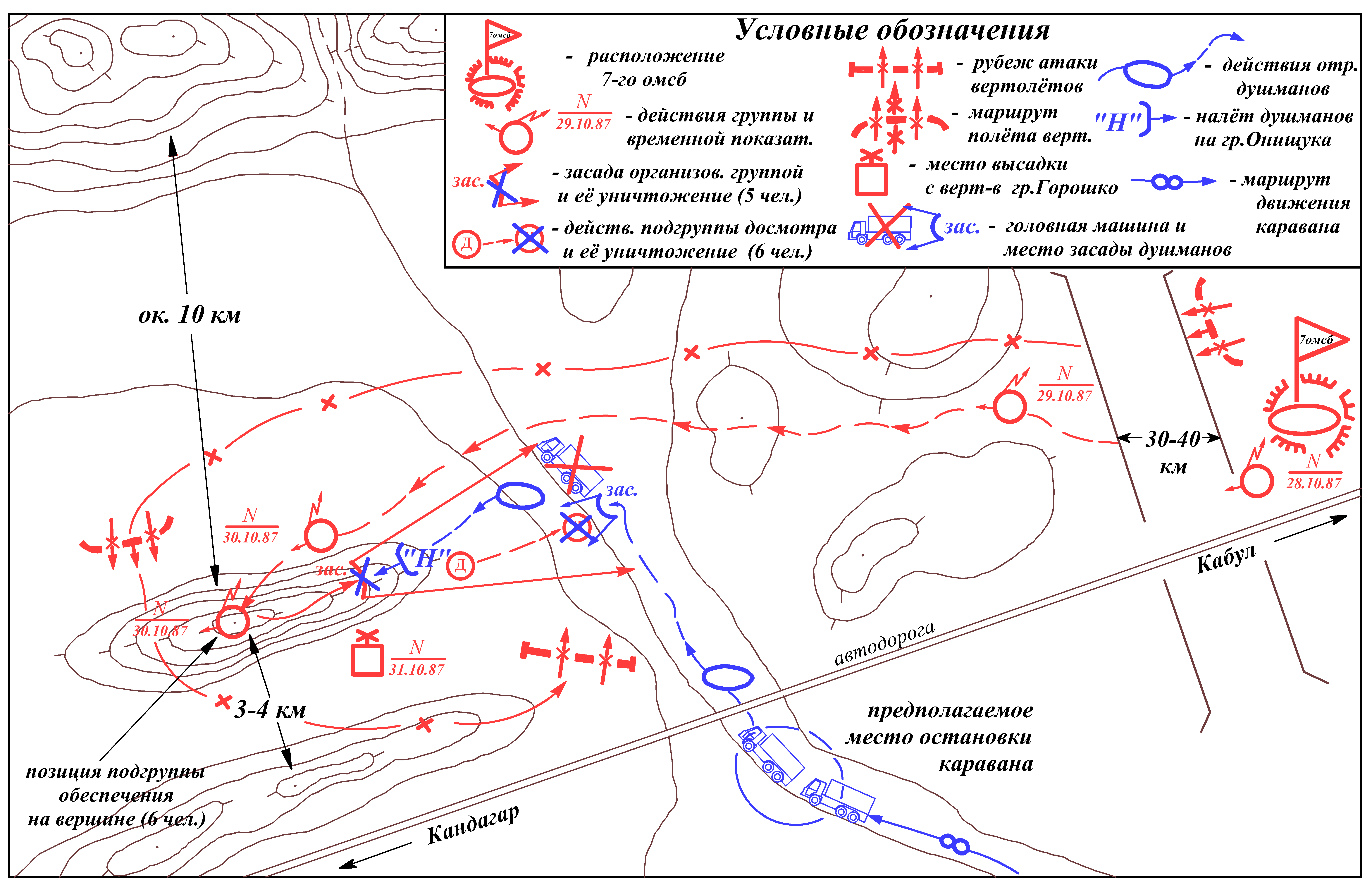 Засада душманов на группу Каспий-724. Иллюстрация частично скопирована из книги Сергей Козлов. Спецназ ГРУ. Том 3. Афганистан - звездный час спецназа. 1979-1989гг. — Москва: «Русская панорама», 2013 стр.495. Расположение дороги Кабул-Кандагар на карте условное. В действительности дорога должна быть расположена севернее (в верхнем участке карты).